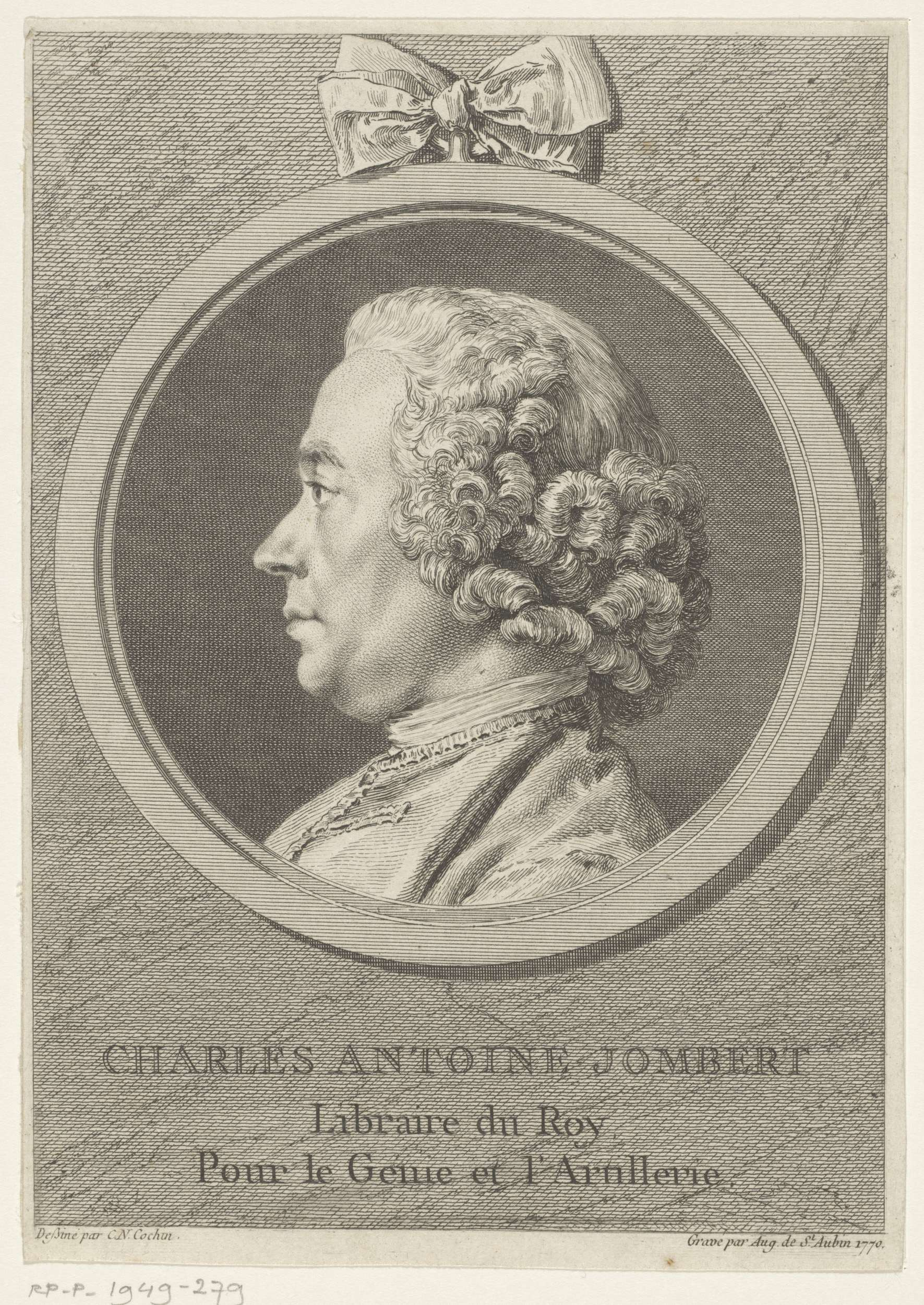 IdentificatieTitel(s): Portret van Charles-Antoine JombertObjecttype: prent Objectnummer: RP-P-1949-279Catalogusreferentie: LeBlanc 68Opschriften / Merken: verzamelaarsmerk, verso, gestempeld: Lugt 2228verzamelaarsmerk, verso, gestempeld: Lugt 4347VervaardigingVervaardiger: prentmaker: Augustin de Saint-Aubin (vermeld op object)naar tekening van: Charles Nicolas Cochin (II) (vermeld op object)Datering: 1770Materiaal: papier Techniek: etsen / graveren (drukprocedé)Afmetingen: blad: h 181 mm (Binnen plaatrand afgesneden.) × b 128 mm (Binnen plaatrand afgesneden.)OnderwerpWat: historical personspublishing, publisher (+ portrait of scholar, scientist)Wie: Charles-Antoine JombertVerwerving en rechtenVerwerving: aankoop 9-mei-1949Copyright: Publiek domein